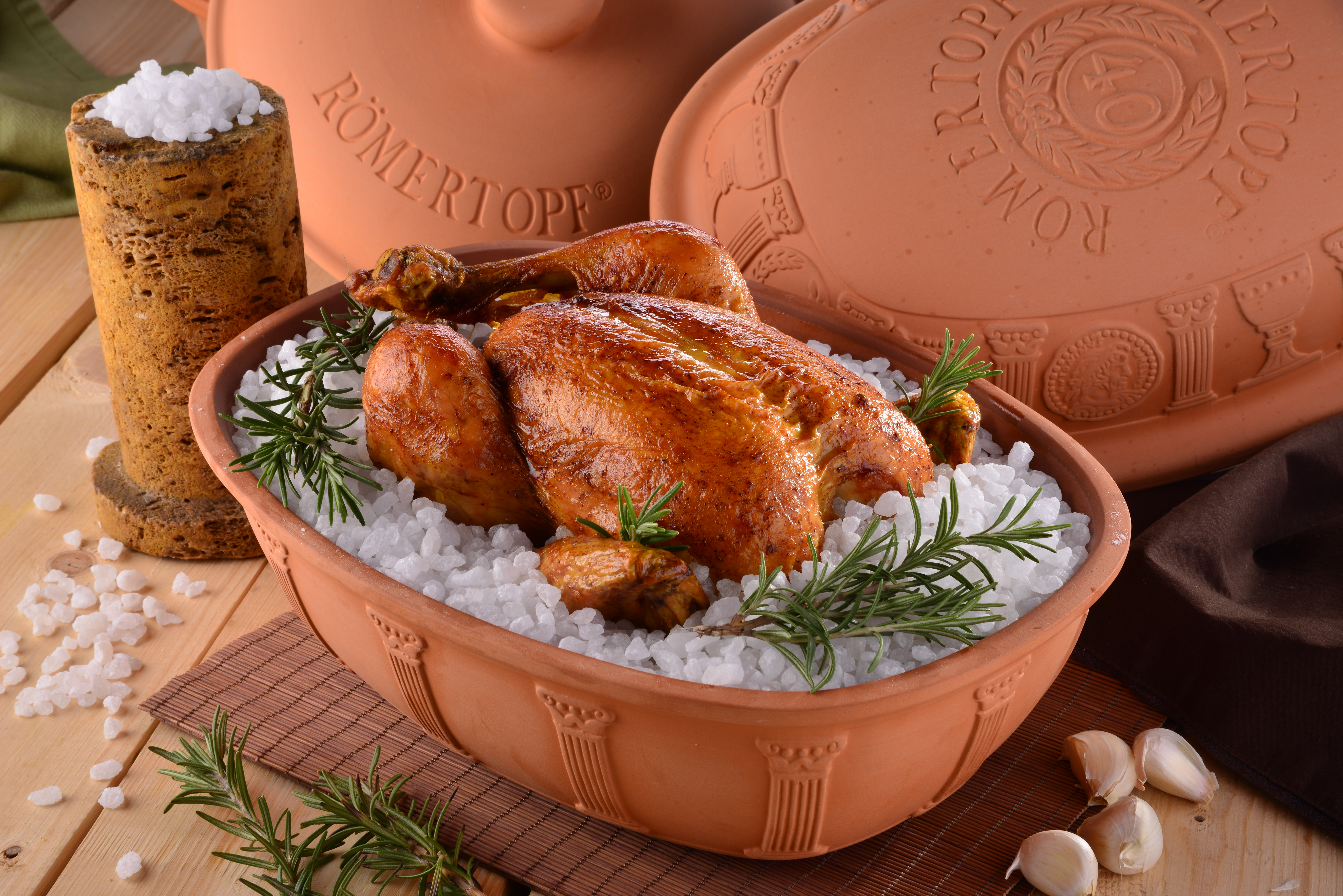 Zubereitungsbeispiel: Masthähnchen im Salzbett